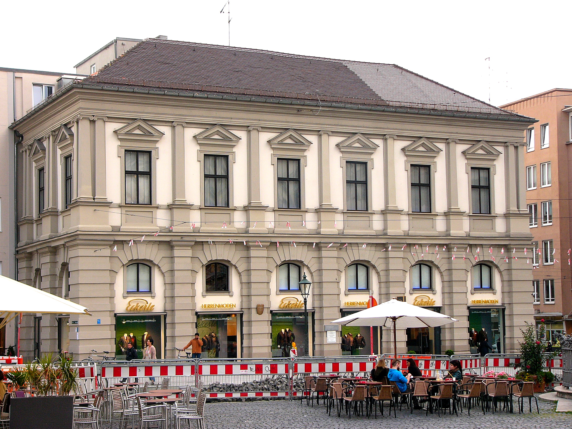 Sog. Neuer Bau; zweigeschossiger Walmdachbau, Erdgeschoss rustizierte Rundbogenarkaden, Obergeschoss mit Pilastergliederung, von Elias Holl, vielleicht nach Entwurf von Matthias Kager, 1614, nach Beschädigungen von 1944 wiederhergestellt.This is a photograph of an architectural monument.